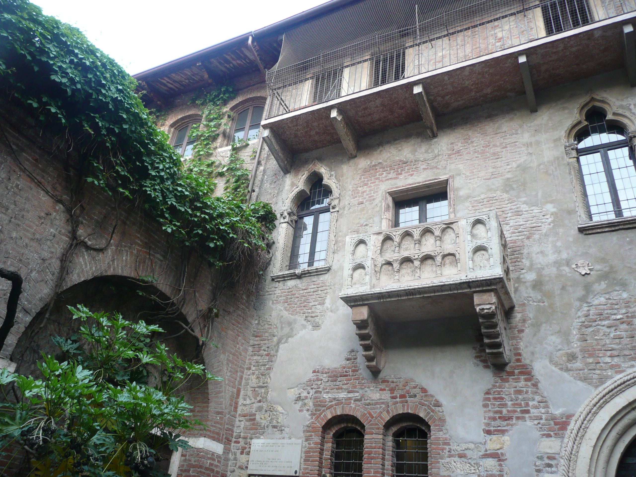 Балкон Джульєтти у Вероні